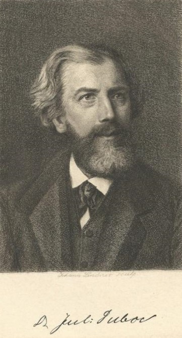 Porträt Julius Duboc. Radierung von Johann Lindner, c. 1900, mit faksimilierter Unterschrift des Porträtierten